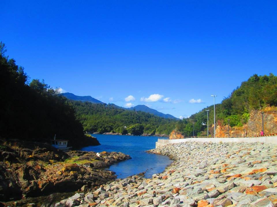 Embarcadero y continuación de la Carretera Austral en Caleta Puelche.